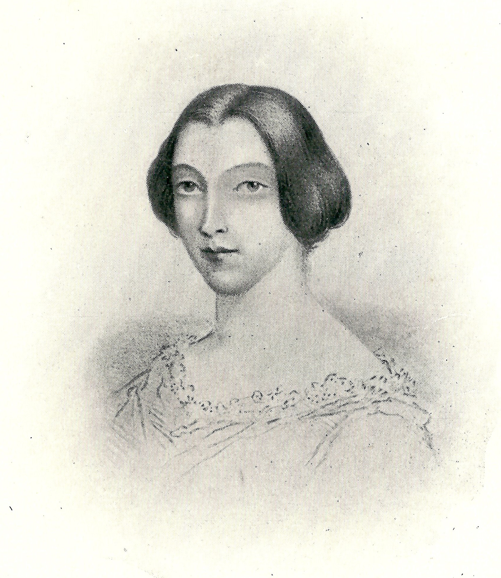 Portrait de Caroline Massin.